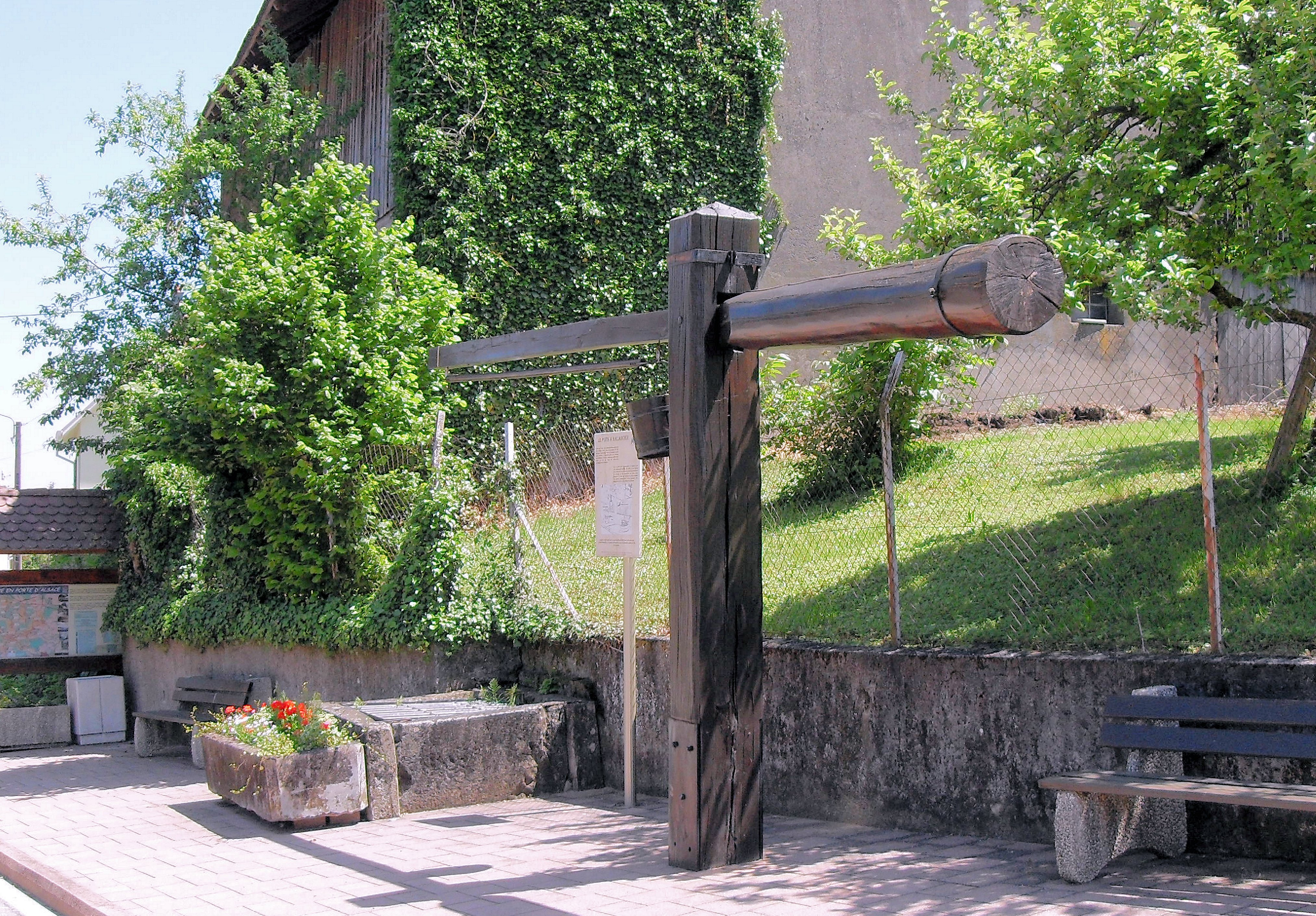 Le puits à balancier d'Eglingen